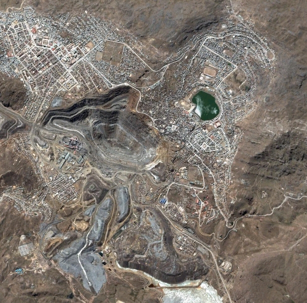 Se muestra la ciudad de Cerro de Pasco antes de la expansión del tajo abierto en el año 1965.